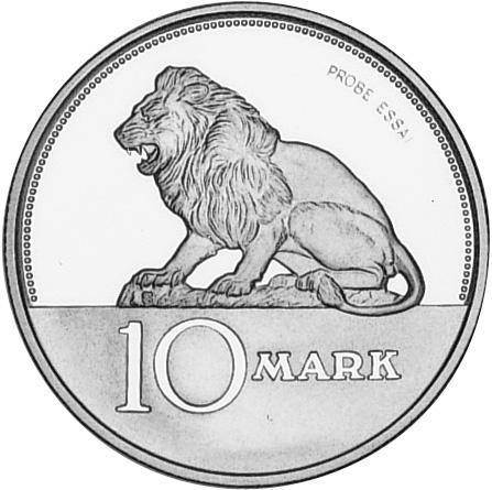 Die Namibia-Mark